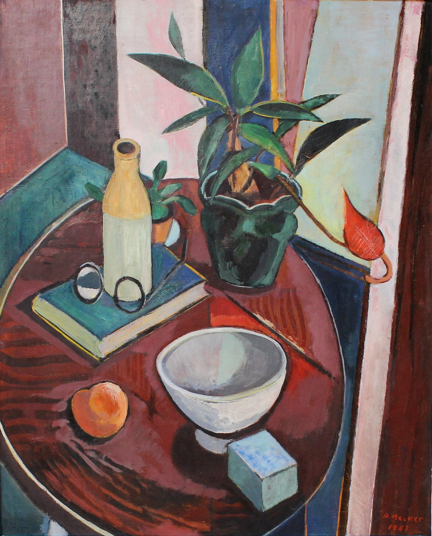 Stilleben